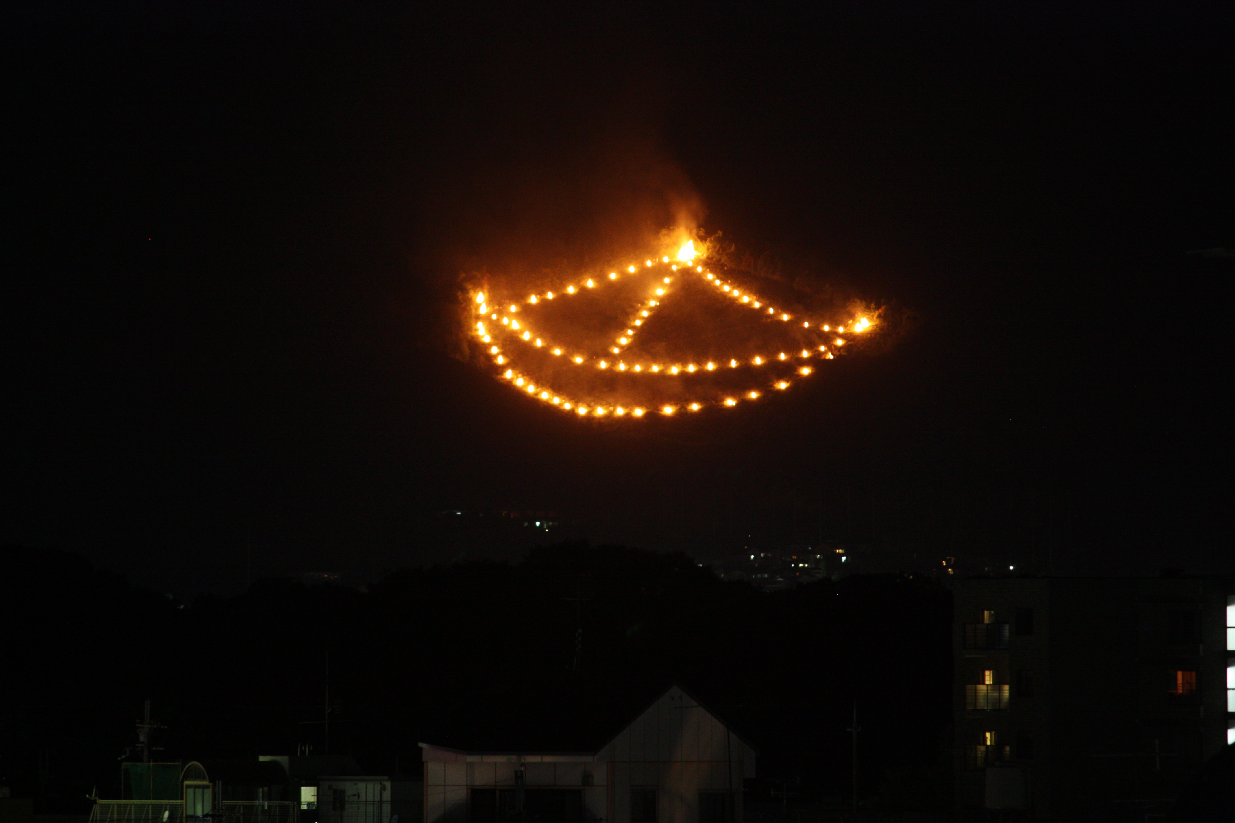 「舟形万灯籠」